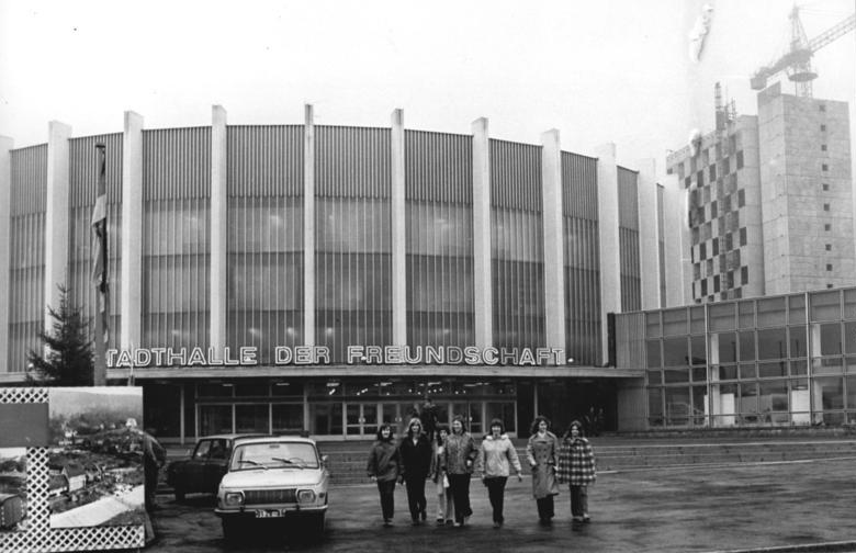 Suhl, Satdthalle ADN-ZB Ludwig-8.11.1972-B-Suhl:Stadthalle ihrer Bestimmung übergeben: In der thüringerischen Bezirksstadt Suhl wurde heute die "Stadthalle der Freundschaft" ihrer Bestimmung übergeben. Sie entstand in deutsch-sowjetischer Gemeinschaftsarbeit und wurde von den Bauschaffenden aus Anlaß des 55. Jahrestages der Großen Sozialistischen Oktoberrevolution fertiggestellt. Mit dem modern eingerichteten Rundbau erhalten die Bürger des gesamten Bezirkes ausgezeichnete Möglichkeiten für die kulturelle und sportliche Betätigung.